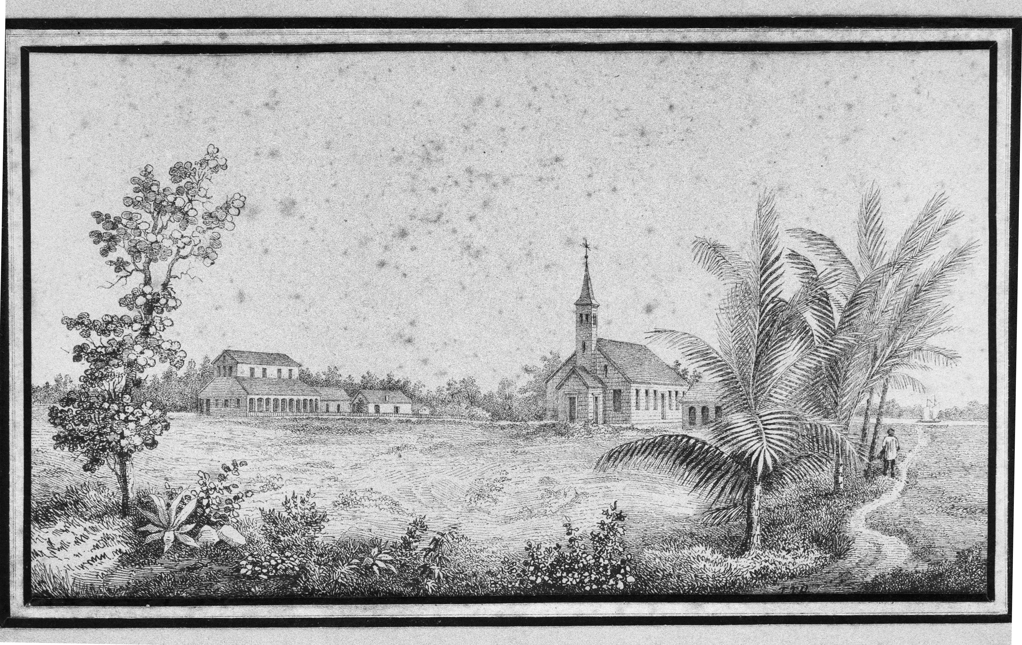 Tekening: Tekening van Clevia in Suriname (opmerking: Reproductie uit archief van de Evangelische Broedergemeente Suriname te Paramaribo.)